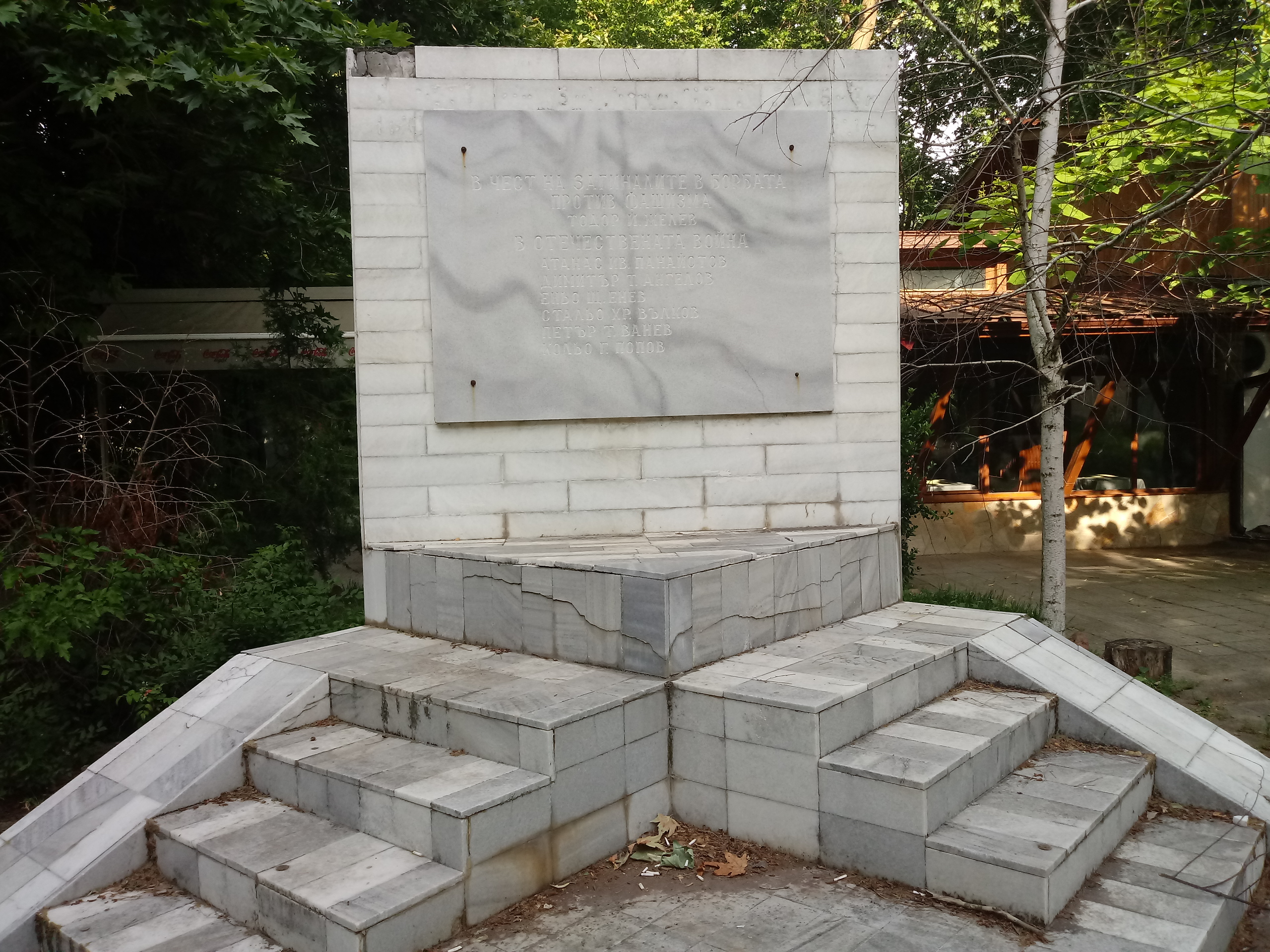 Паметна плоча на загиналите през Втората световна война жители на с. Бяла река